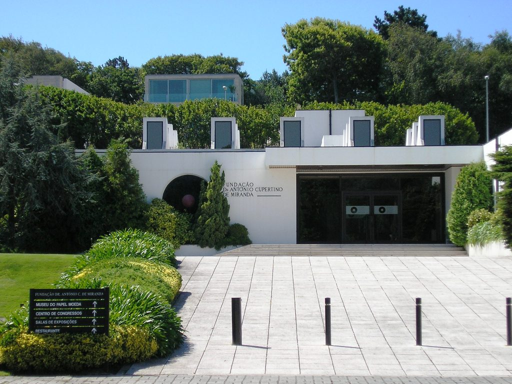 "Museu do Papel Moeda" in Porto, Portugal